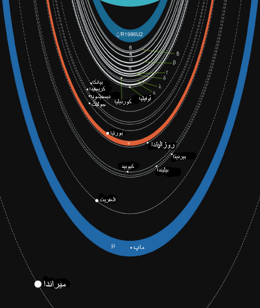 رسم لنظام حلقات وأقمار كوكب أورانوس.